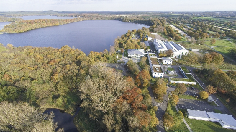 Wasserwerk Haltern, Luftaufnahme